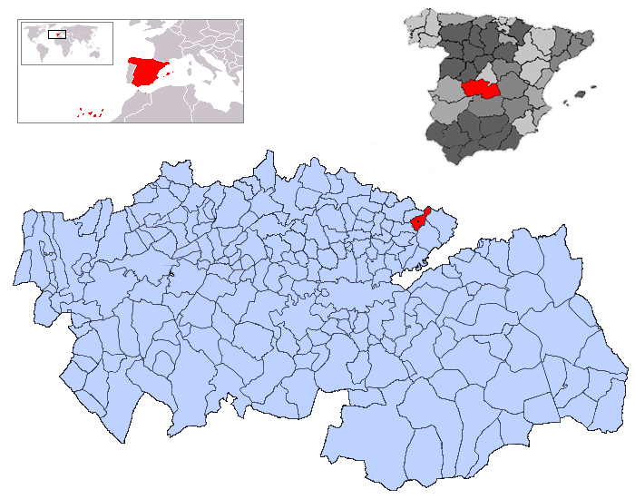 Esquivias en la provincia de Toledo